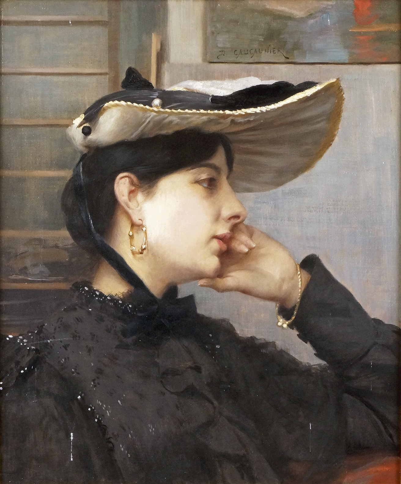 Portrait de jeune femme en capelline